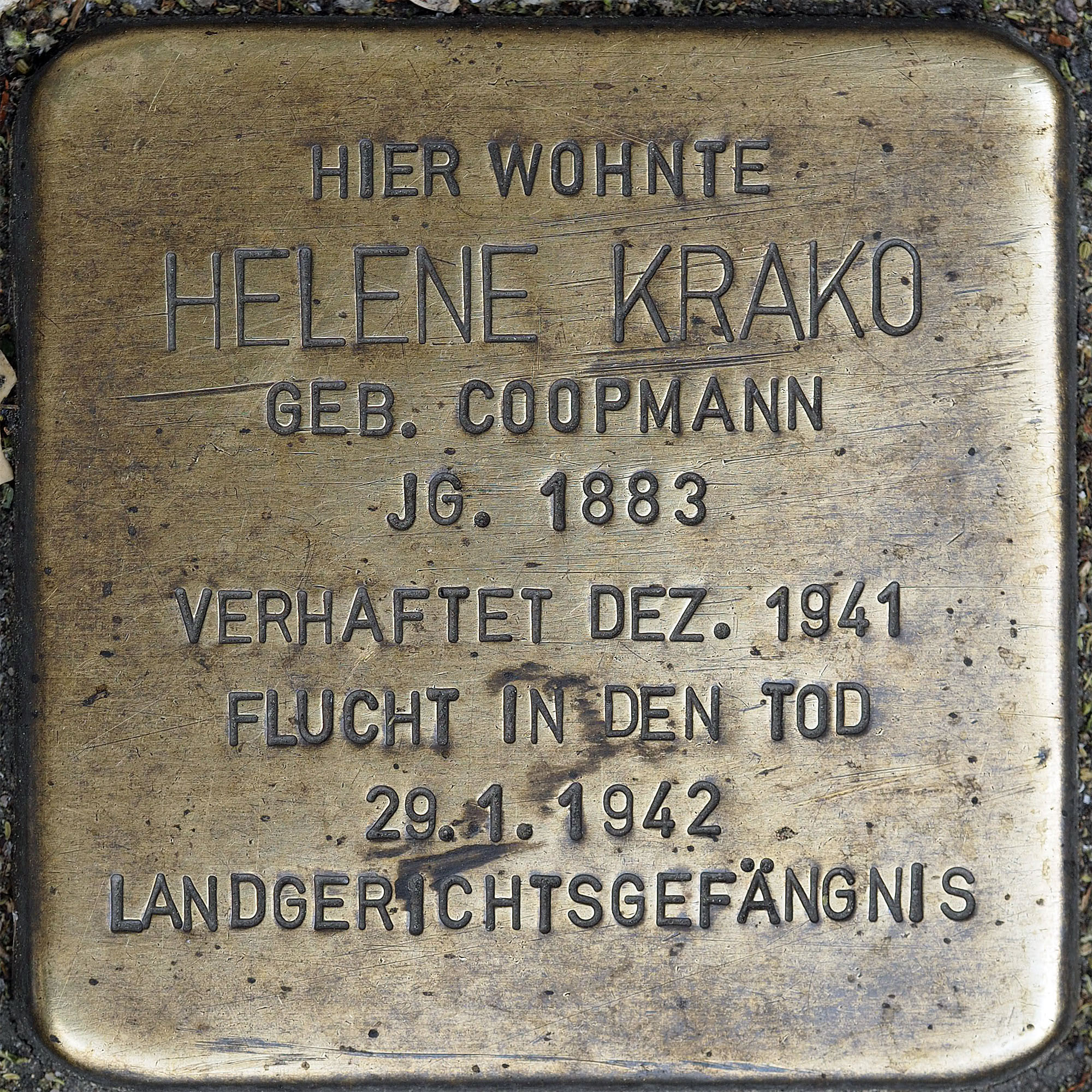 Stolpersteine MG: Krako, Helene